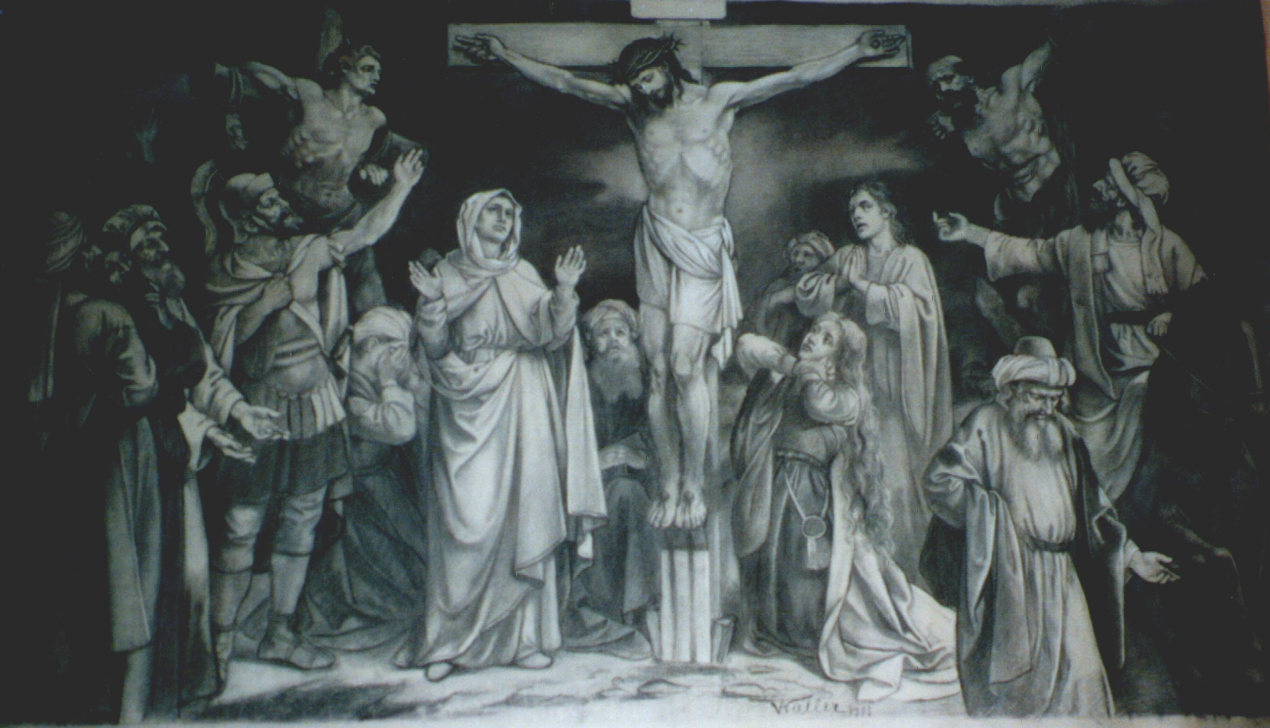 Original Kohlezeichnung von 1915, Grösse: 1,46m x 0,95m. Es zeigt die Kreuzigungsszene auf Golgata